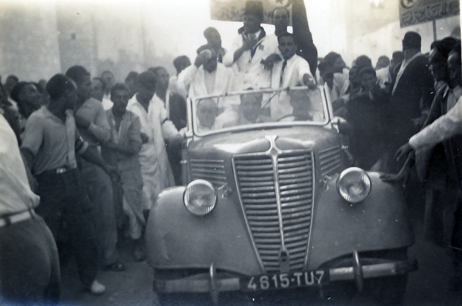 Bourguiba à Mahdia au début des années 1950 (quelques années avant l'indépendance de la Tunisie)